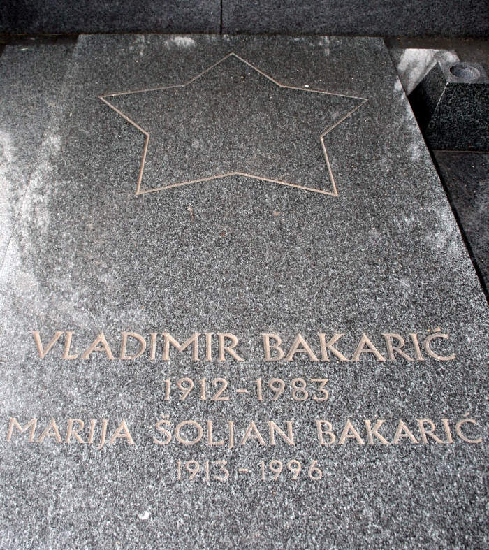 grob Vladimira Bakarića na Mirogoju u Zagrebu